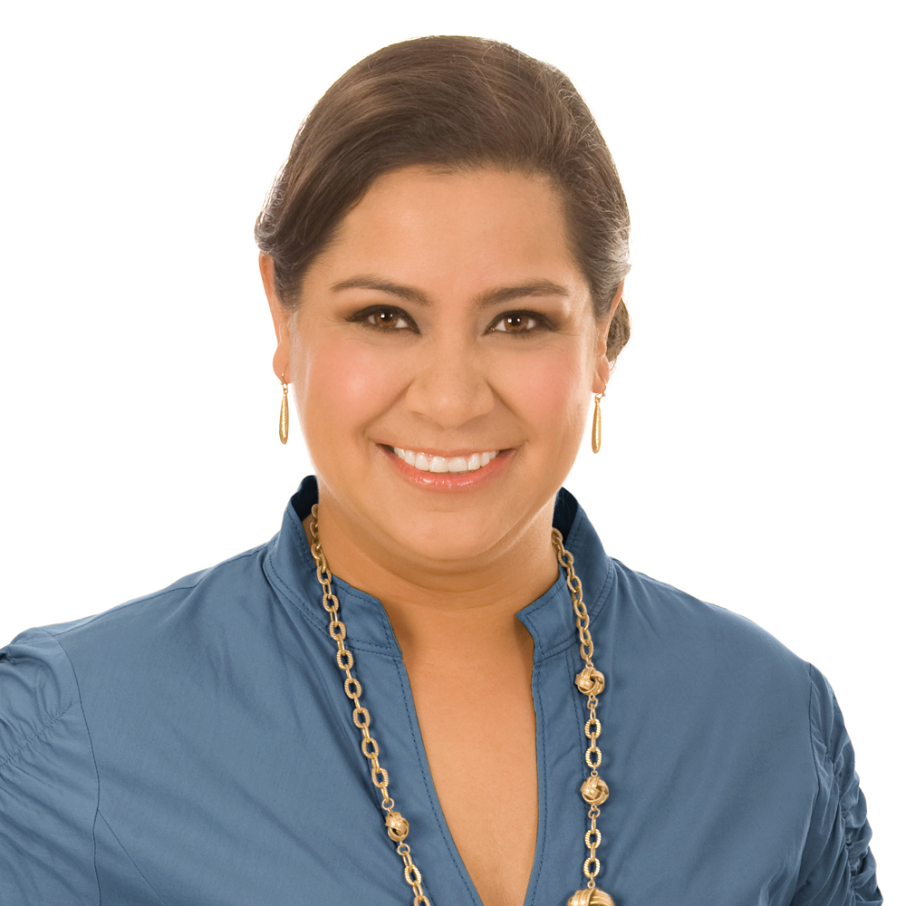 Retrato oficial de la política mexiquense Adriana González Carrillo del estado de México